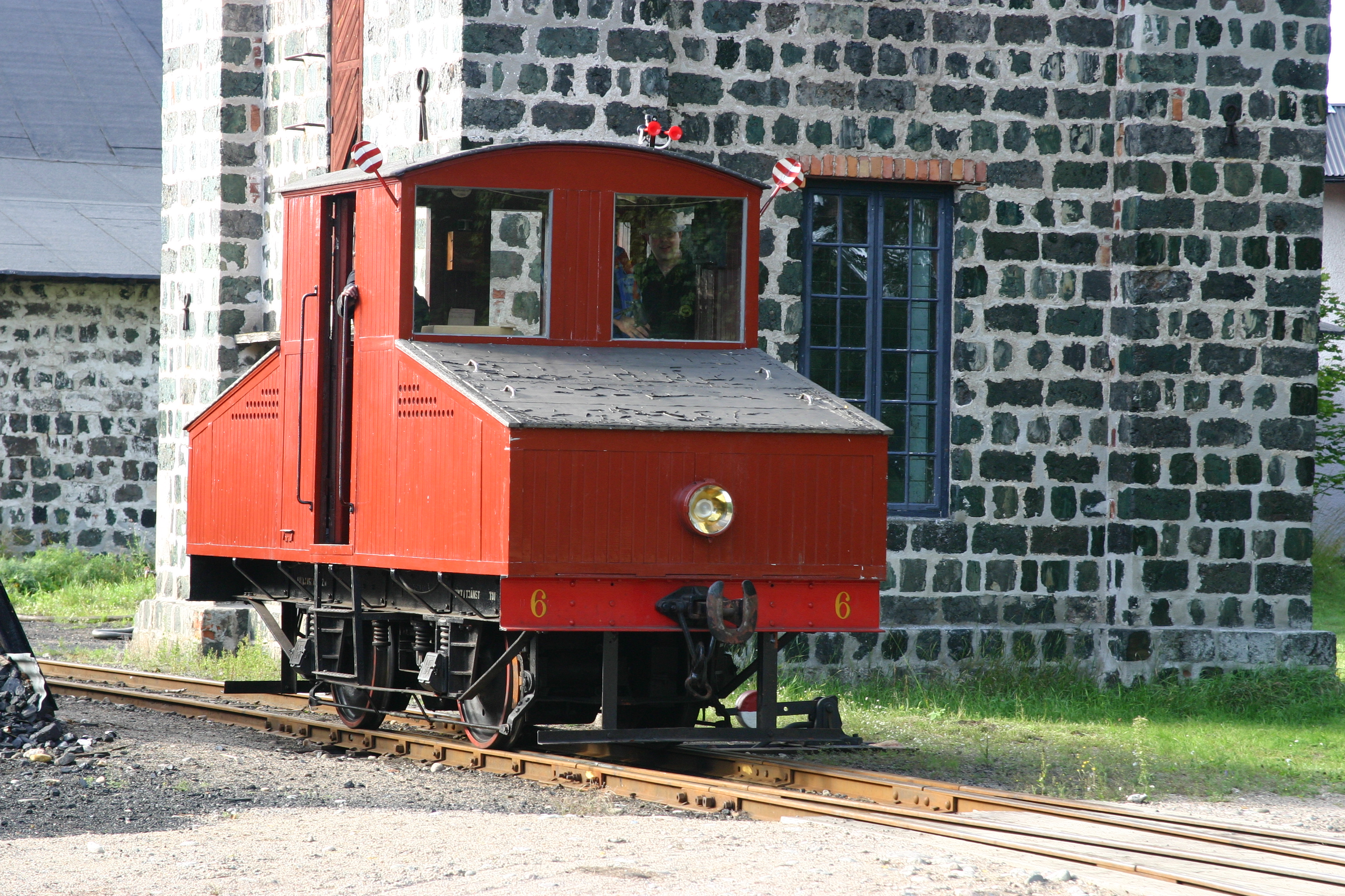 Akkulokomotive 6 der JTJ in Jädraås 16.08.08